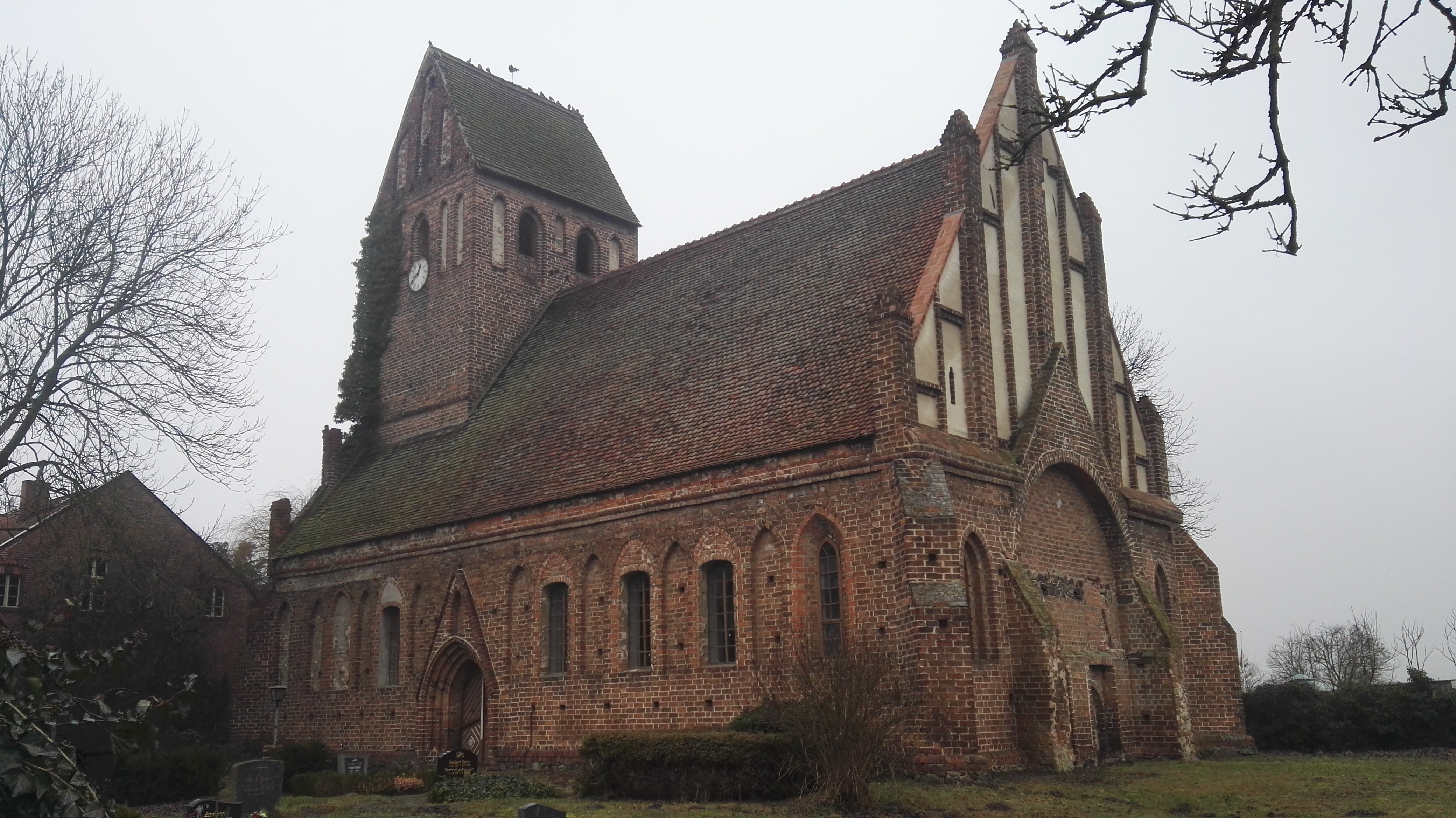 denkmalgeschützte Backsteinkirche in Buckow; Ortsteil der Gemeinde Nennhausen in Brandenburg